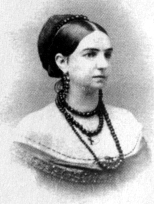 Maria Obrenovici